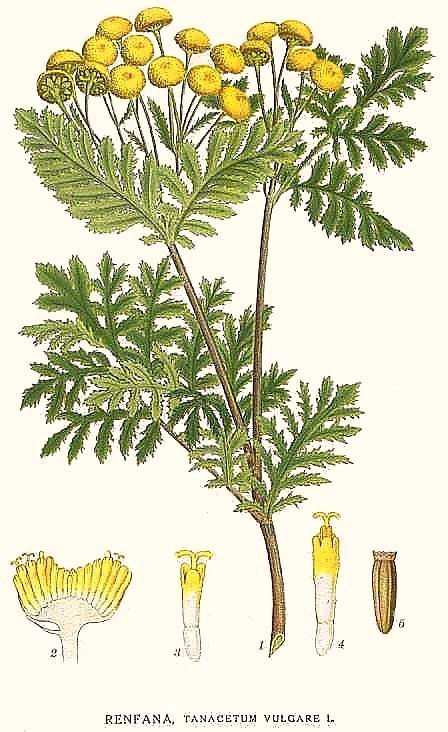 Original Description Renfana, Tanacetum vulgare L.